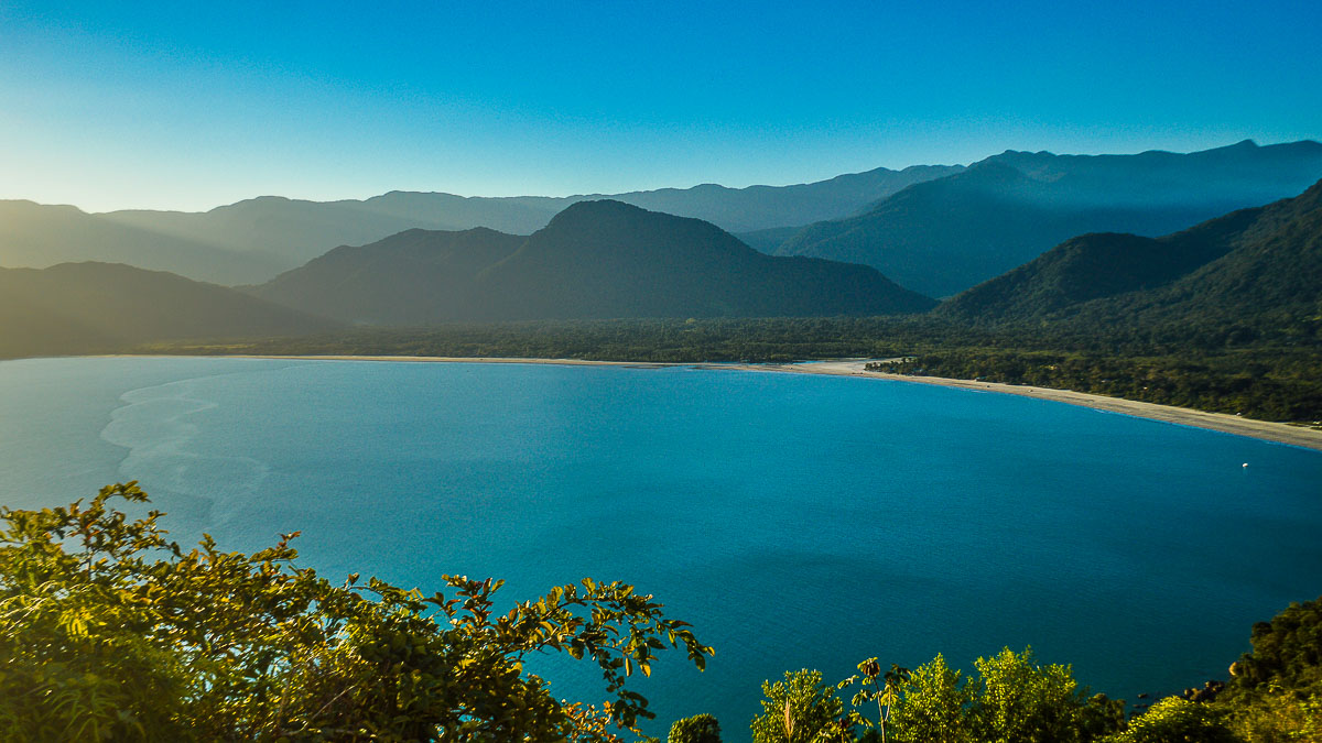 Vista da Praia do Ubatumirim e Estaleiro do Padre e, ao fundo, a Serra do Mar (área de proteção ambiental). A estrada leva também as Praias da Almada, Engenho e Brava da Almada.